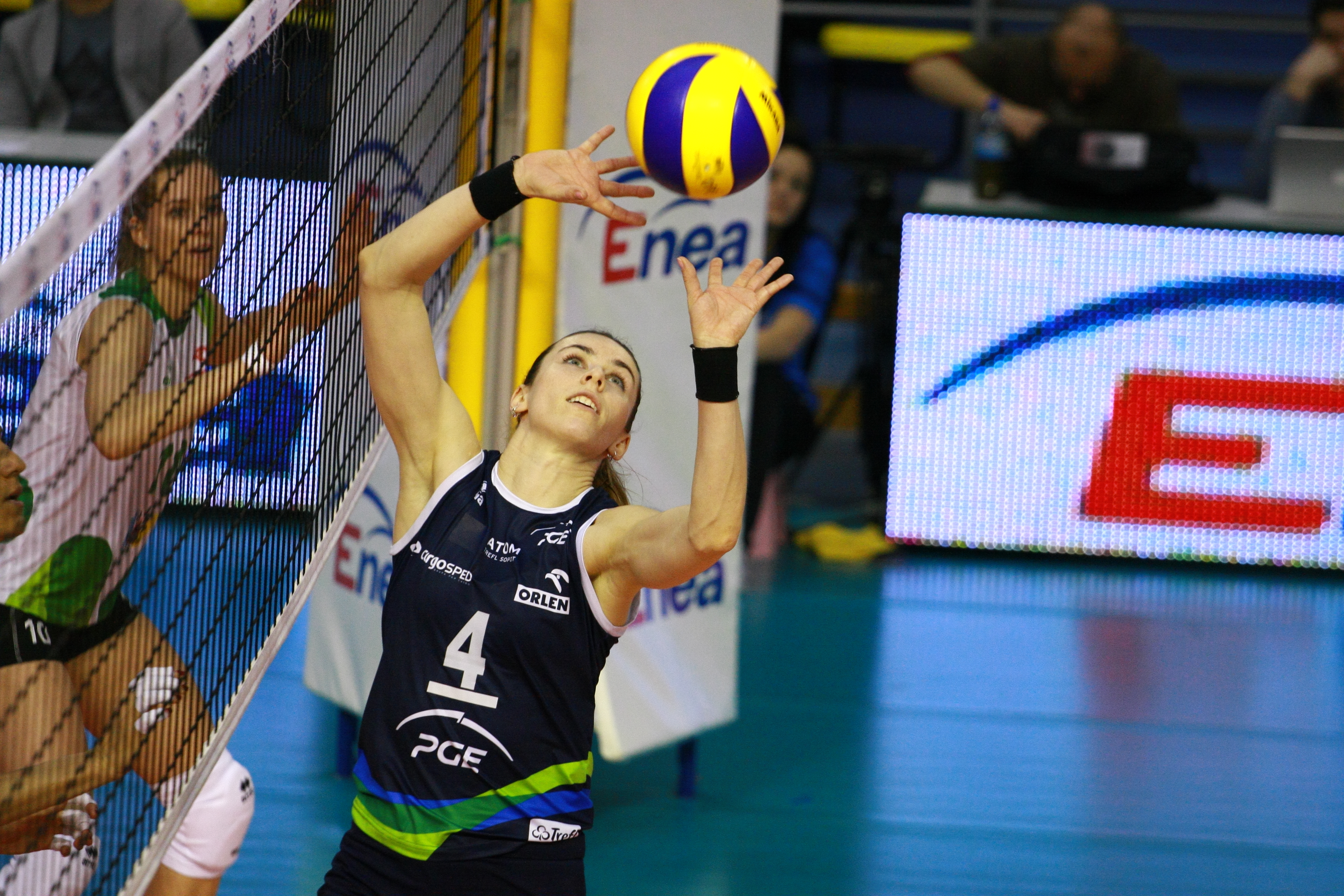 Atom Trefl Sopot Bank BPS Muszynianka Fakro Muszyna Tauron MKS Dąbrowa Górnicza Impel Gwardia Wrocław